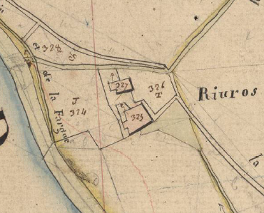 Riurós, de Sant Llorenç de Cerdans, en el Cadastre napoleònic del 1812 (Arxius Departamentals dels Pirineus Orientals)